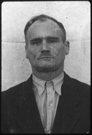 Christof Ludwig Knoll (* 20. April 1895; † 29. Mai 1946 in Landsberg am Lech) war Funktionshäftling im KZ Dachau. Knoll wurde im Dachau-Hauptprozess zum Tode verurteilt und hingerichtet.